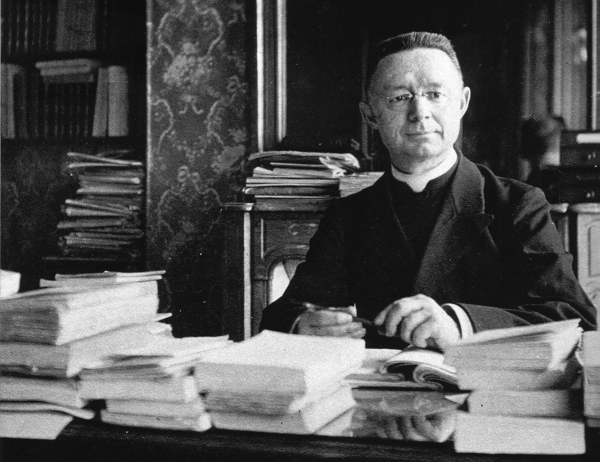 Le chanoine Lionel Groulx à son bureau à l'hôtel Jean Bart, à Paris, le 1er mars 1922 (réf., p.47)